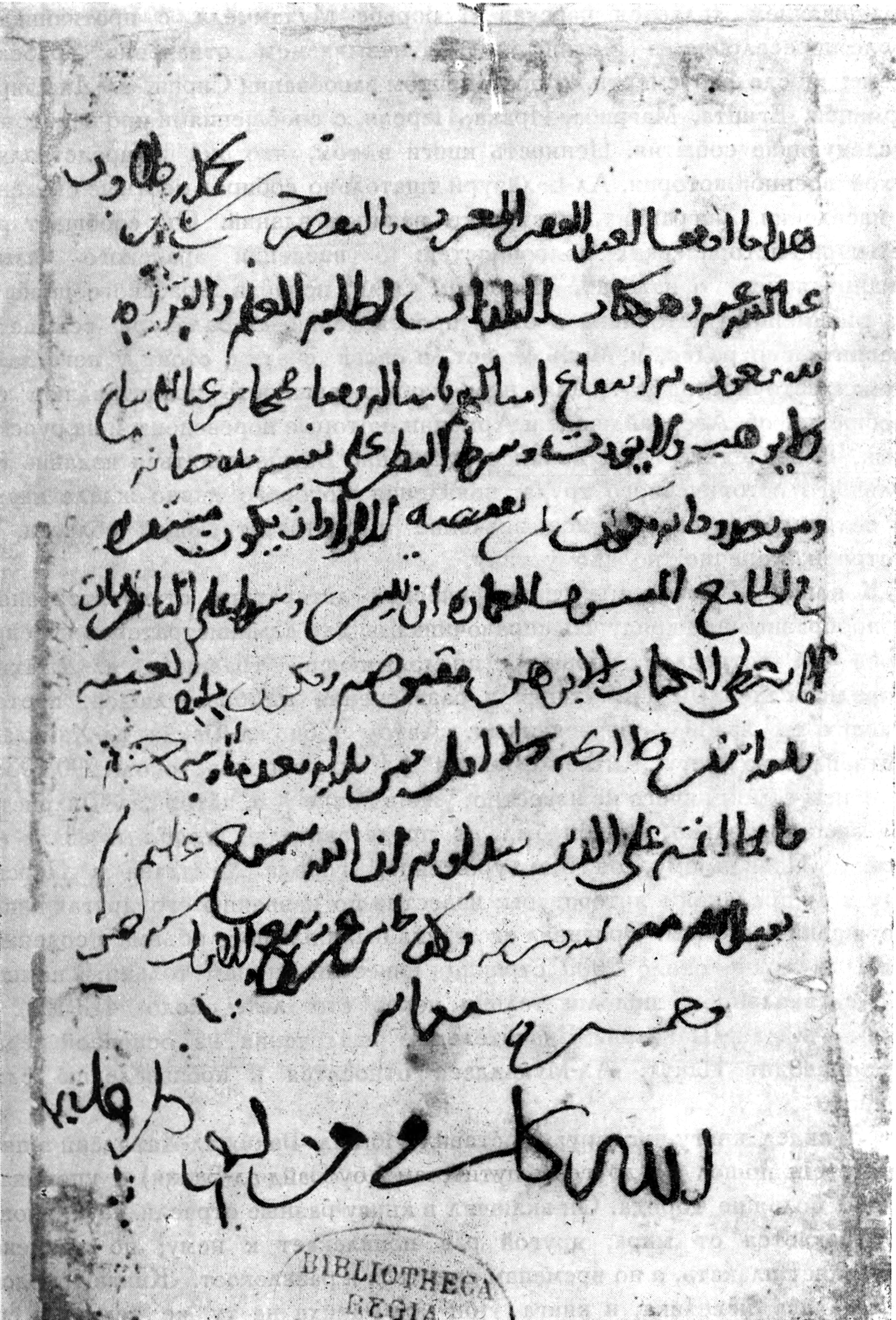 Рукопись А. Мухлинского. Баварская Государственная библиотека в Мюнхене, arab. 446В, л. 826.